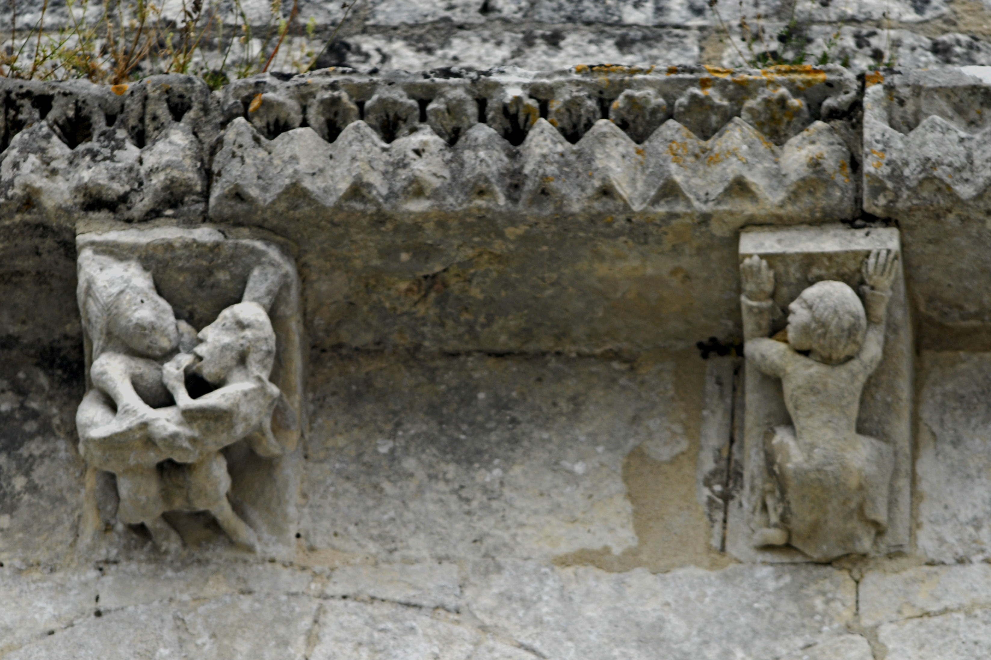 Notre-Dame Corme-Écluse,Kragsteine Nr. 1+2